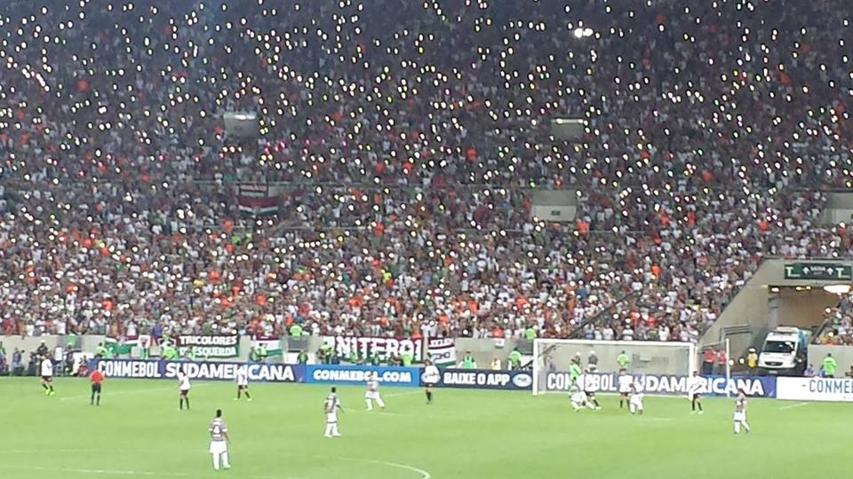 Torcida do Fluminense Football Club em 6/4/2017 contra o Liverpool (Uruguai).